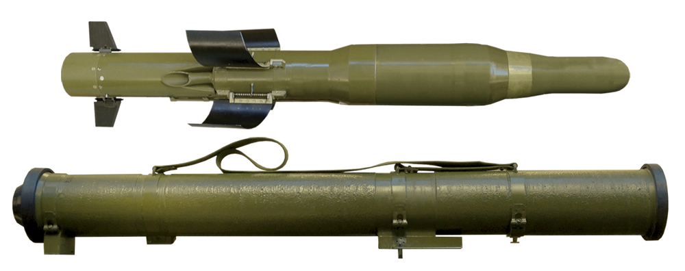 Зокрема РК-3К оснащена тандемною кумулятивною бойовою частиною. Вона призначена для ураження сучасних броньованих нерухомих і рухомих об’єктів, які мають комбіновану, рознесену або монолітну броню, зокрема з динамічним захистом. А також по завислих вертольотах. Ця ракета забезпечує бронепробиття за динамічним захистом не менше ніж 550 мм. Тоді, як РК-3ОФ оснащена осколково-фугасною бойовою частиною з ударним ядром і призначена для ураження легкоброньованих об’єктів, споруд польового типу (ДОТ, ДЗОТ) та живої сили.